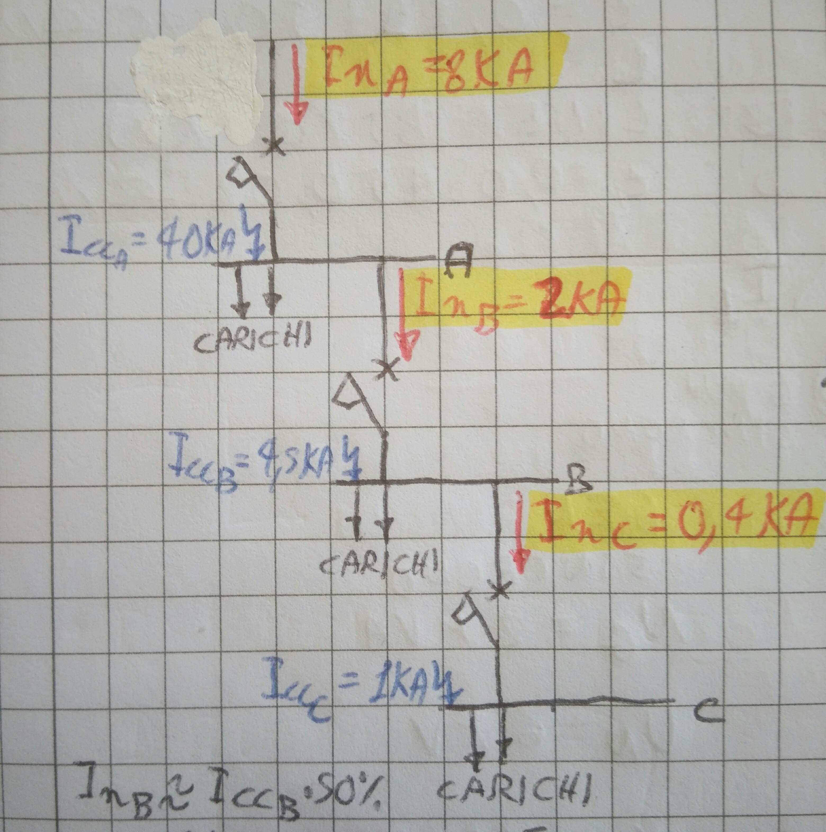 è un esempio di una parte di una rete